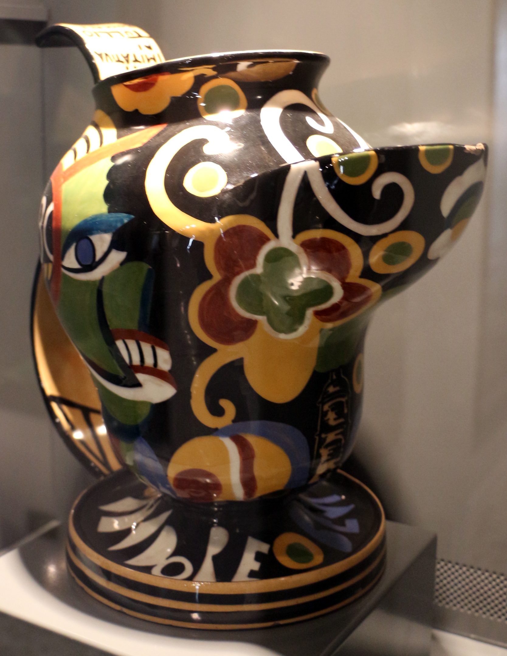 Il parco e i musei di Nervi This is a photo of a monument which is part of cultural heritage of Italy.